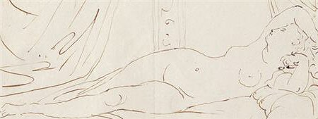 Ingres, dessin de 1832 décrivant la dormeuse de Naples, département des manuscrits de la bibliothèque nationale Paris